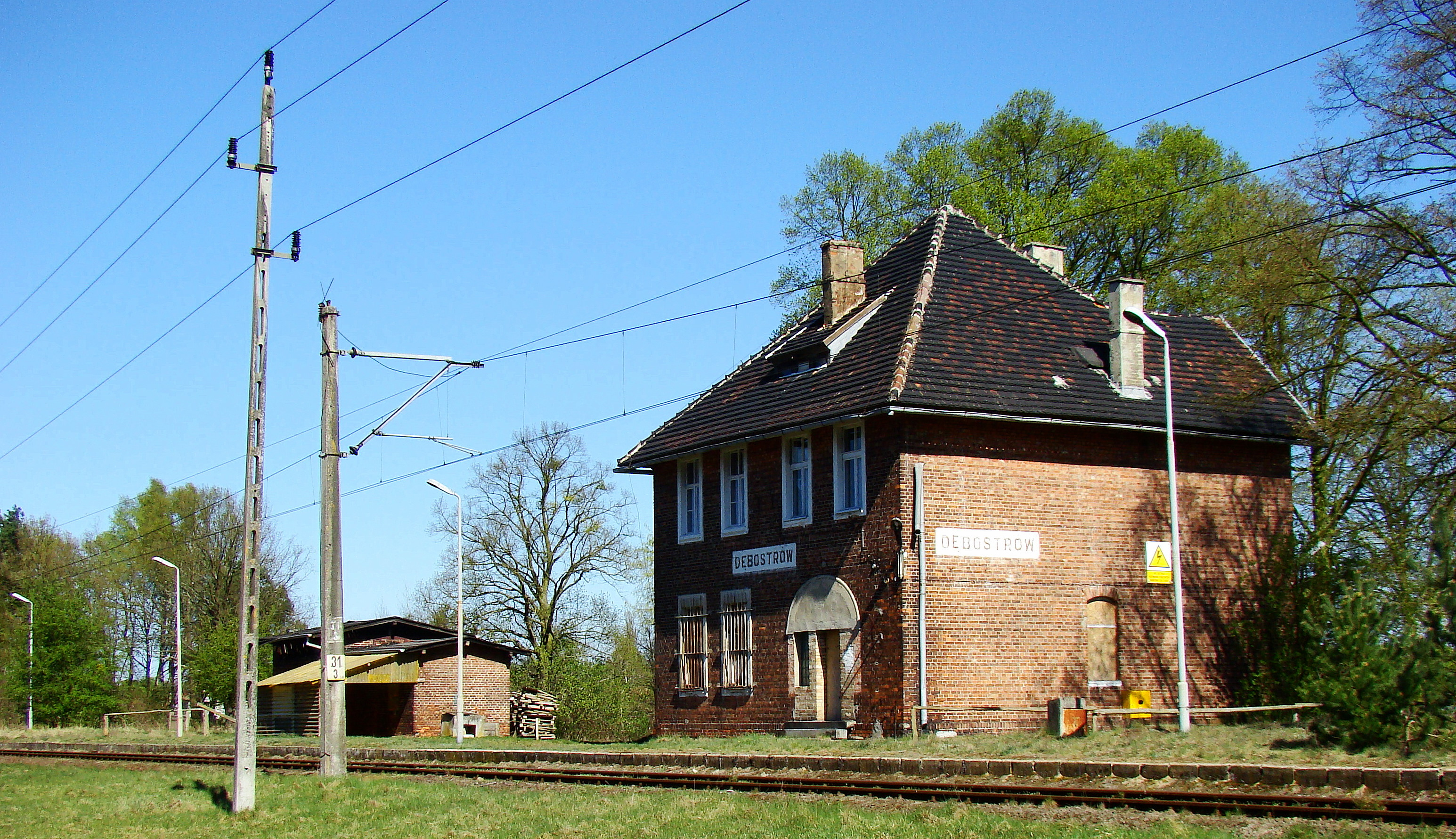 Dębostrów, przystanek kolejowy (nieczynny), (Gmina Police, Województwo zachodniopomorskie), Polska